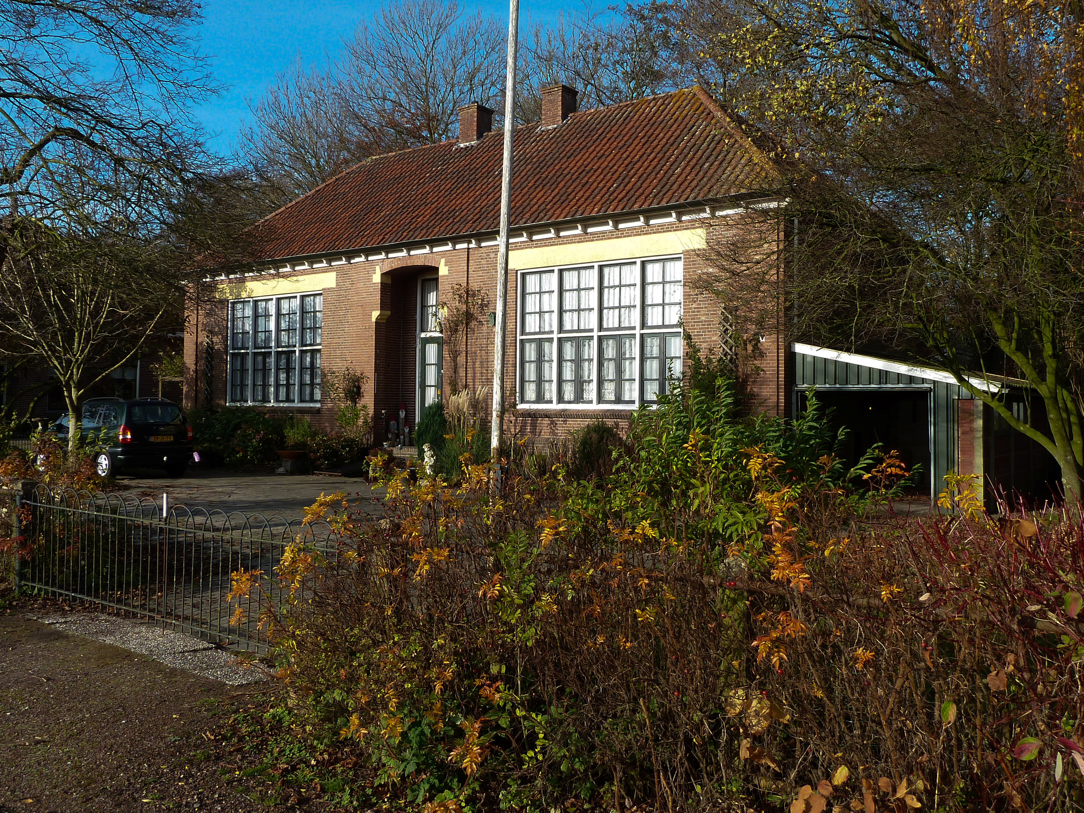 De voormalige openbare lagere school van Woudbloem